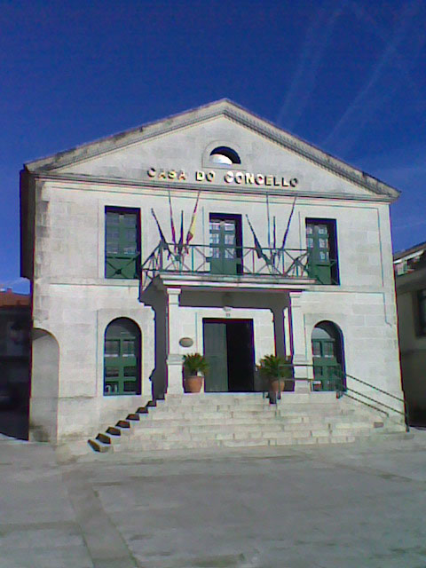 Casa consistorial de Cerdedo